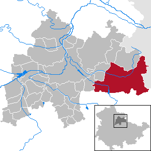 Buttstädt in Thuringia - District Sömmerda